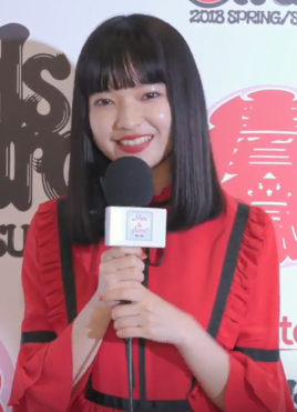 田中芽衣です。